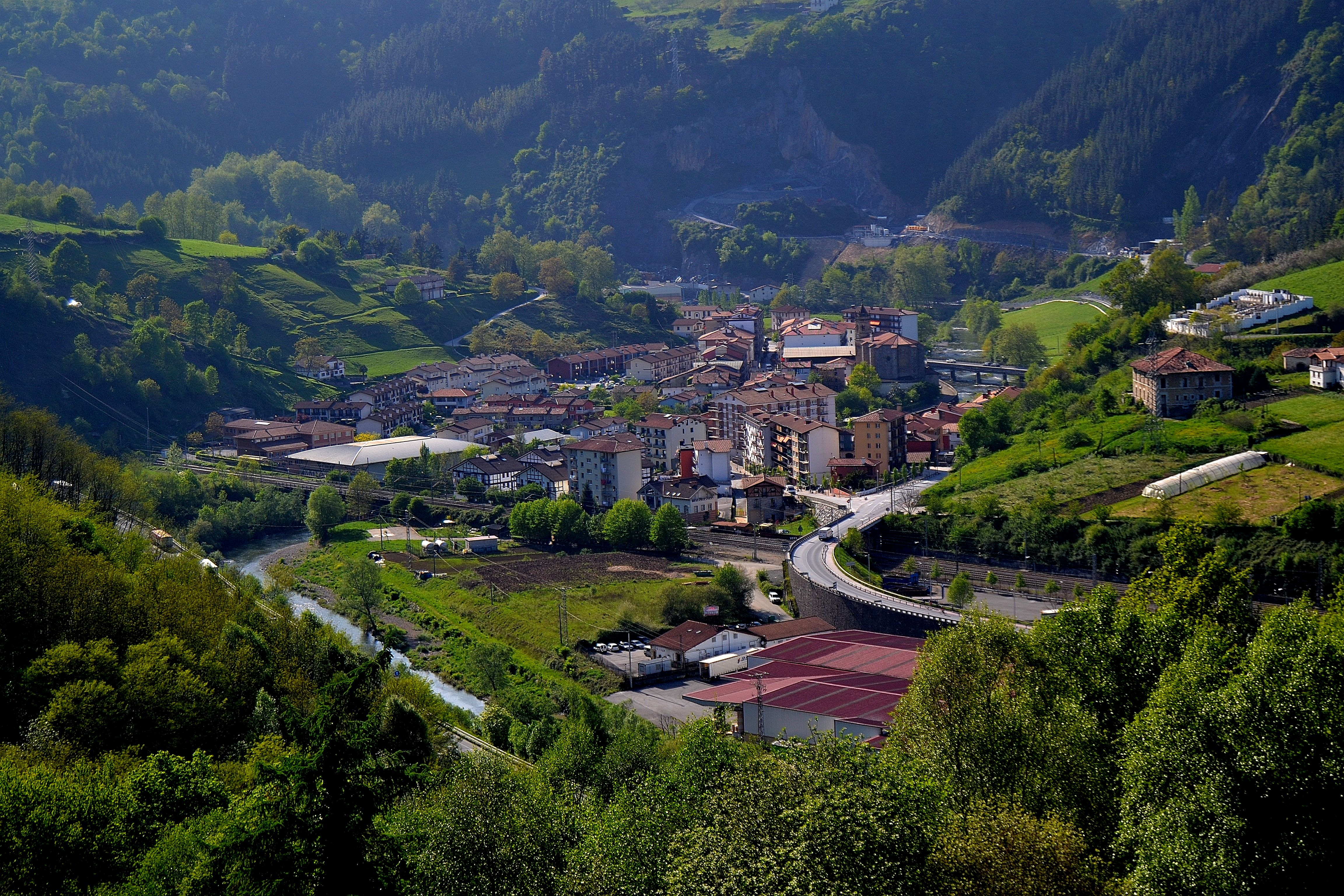 Legorreta. Goierri, Gipuzkoa. Euskal Herria. Legorreta. Goierri, Gipuzkoa. Basque Country.